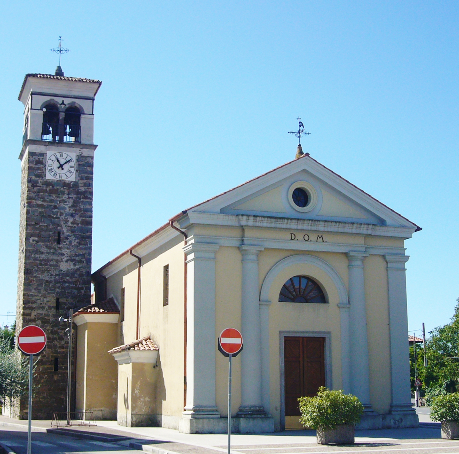 La chiesa parrocchiale di Mereto di Capitolo